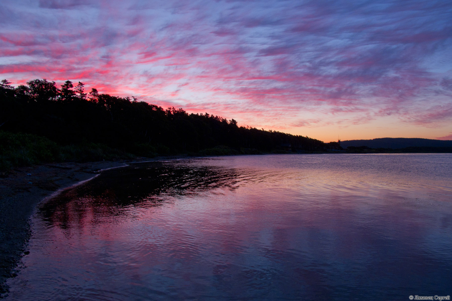 Озеро Тунайча: Центр - 46°46'05" N 143°12'09" E.,Корсаковский район, Сахалинская область This image is related to the protected area of Russia number 6510033